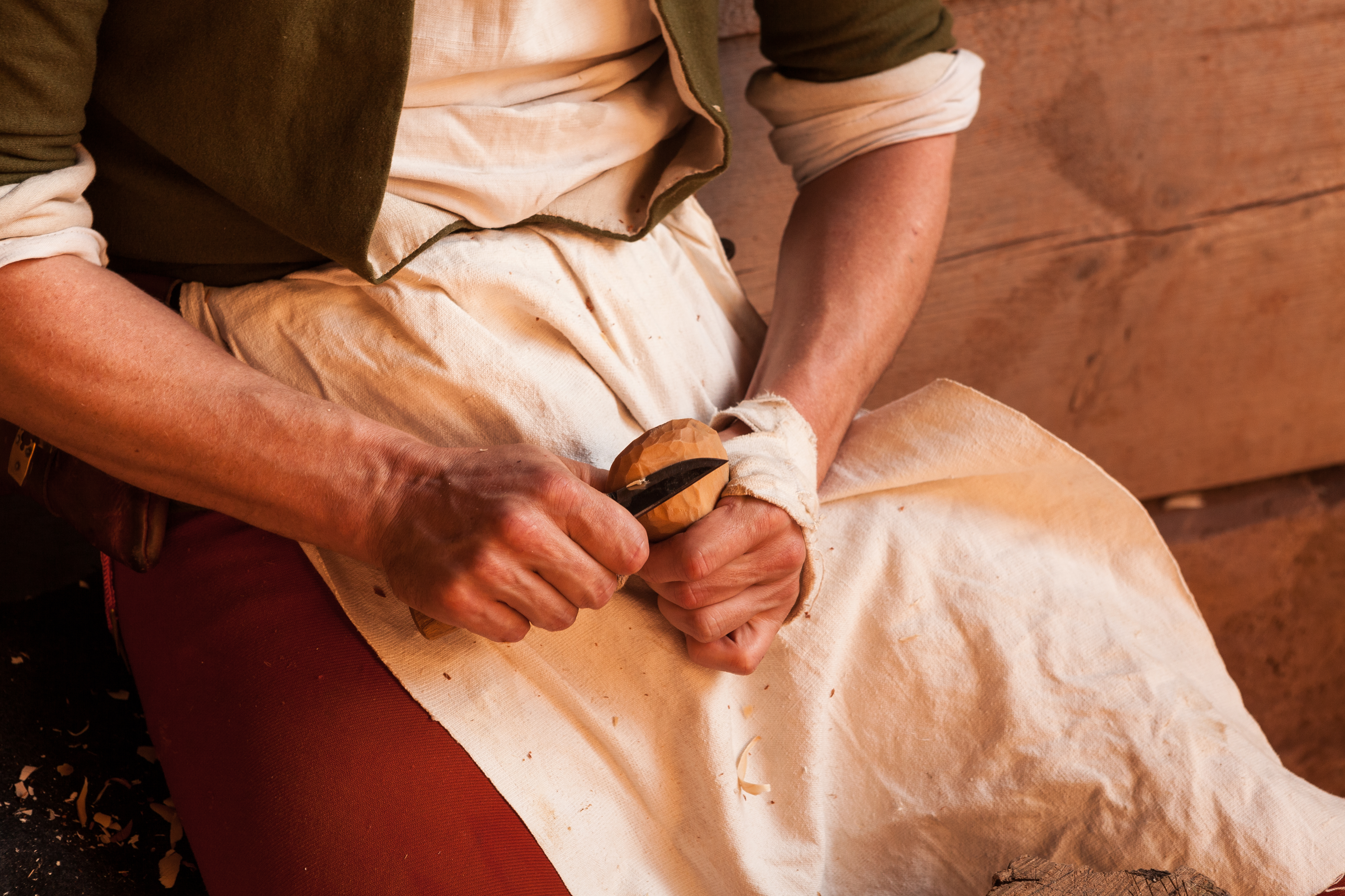 Mann beim Schnitzen eines Holzlöffels.